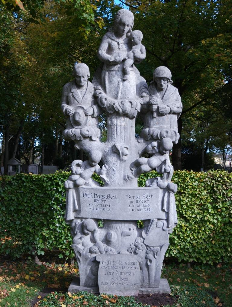 Grab des Malers, Bildhauers und Zeichners Hans Best (1874-1942) auf dem Westfriedhof in München